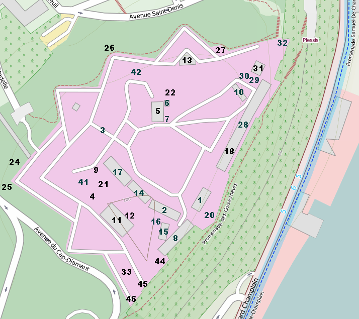 Carte de la Citadelle de Québec avec numéros des bâtiments